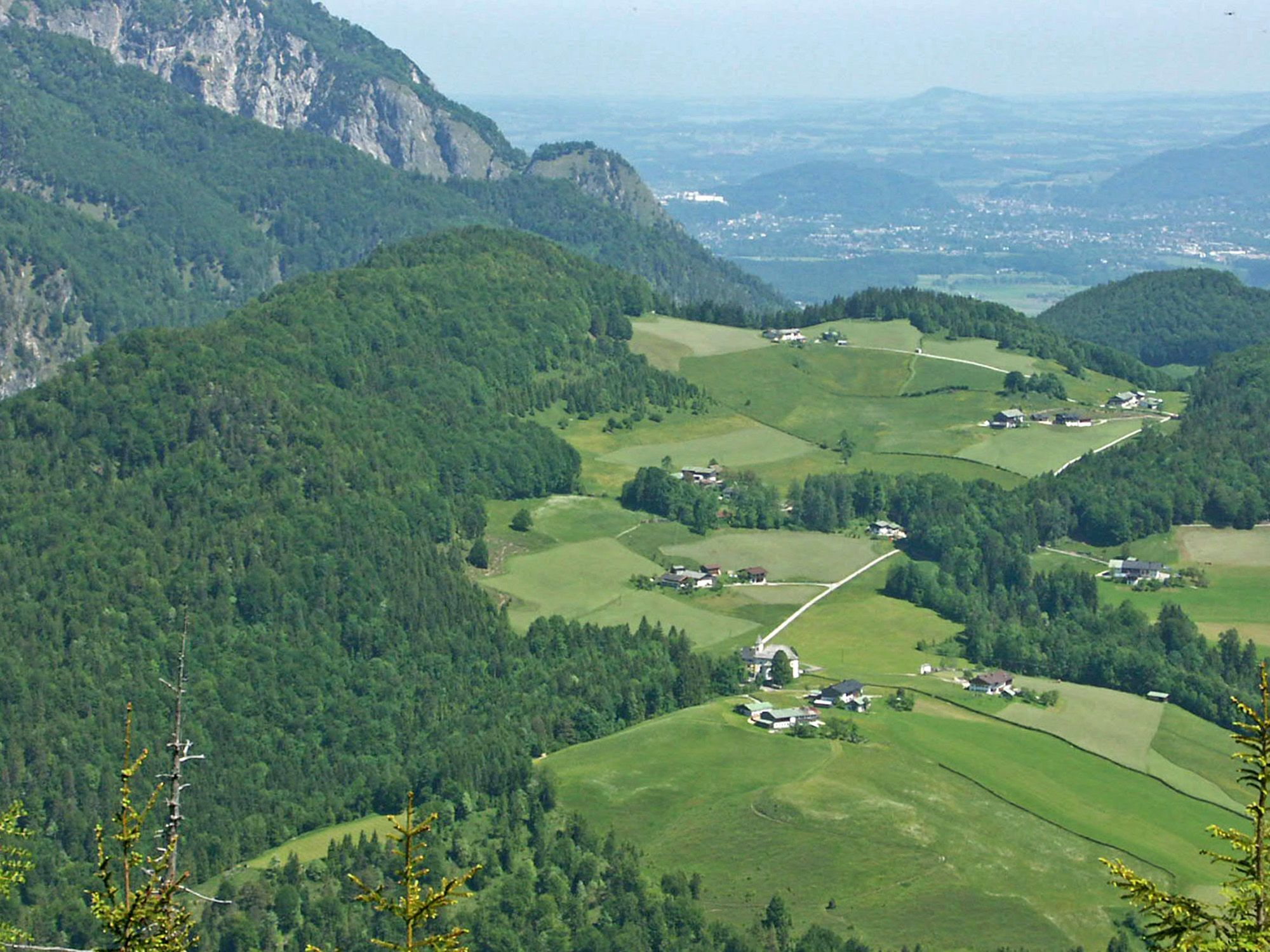 Der Salzburgblick von der Kneifelspitze bei Berchtesgaden